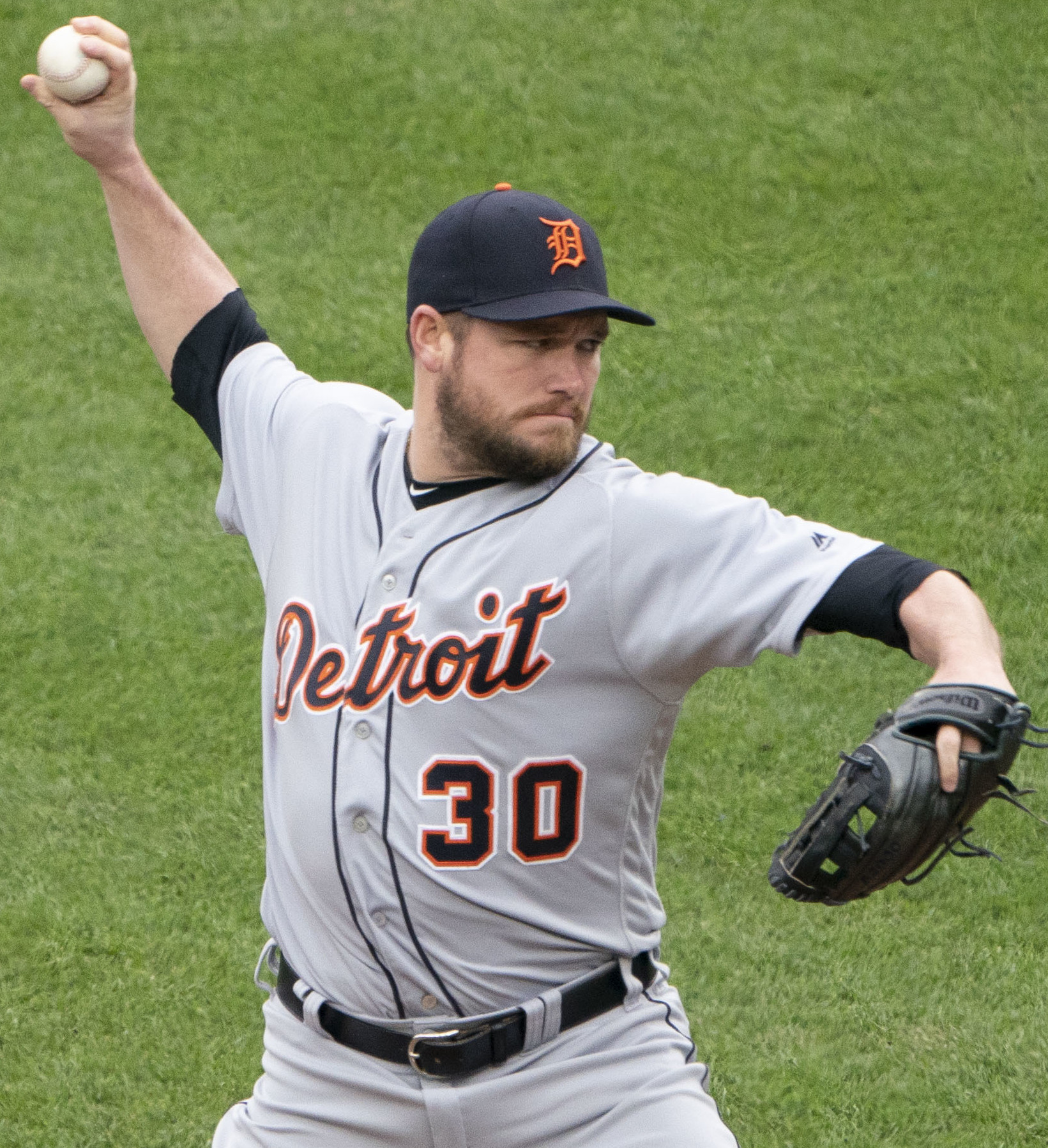 Tigers at Orioles 4/29/18